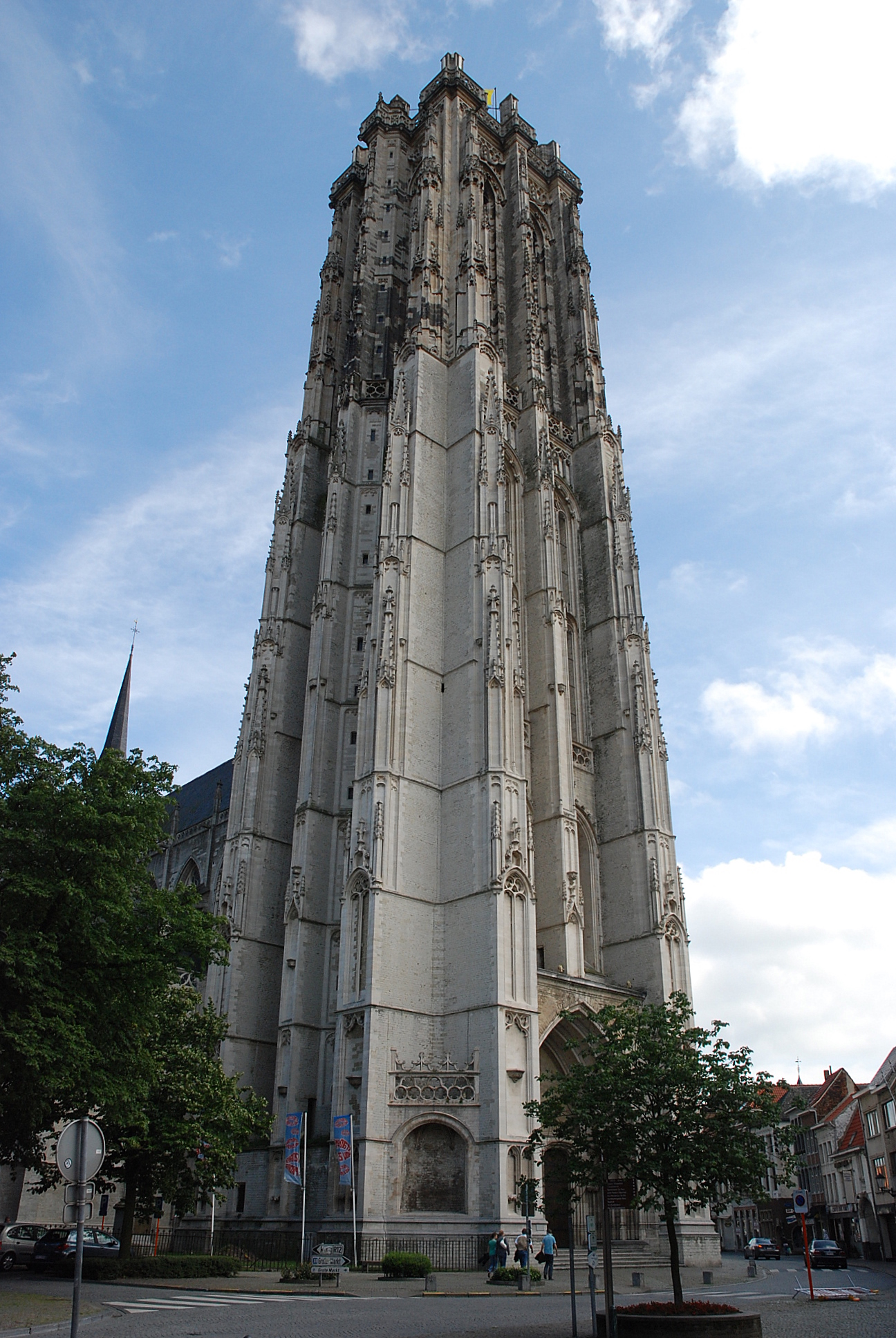 de Sint-Romboutskathedraal in Mechelen, België